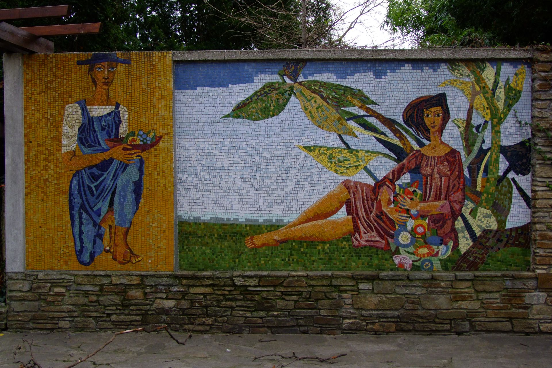 Mosaikwandbild, Donizettiweg 29, Donaustadt